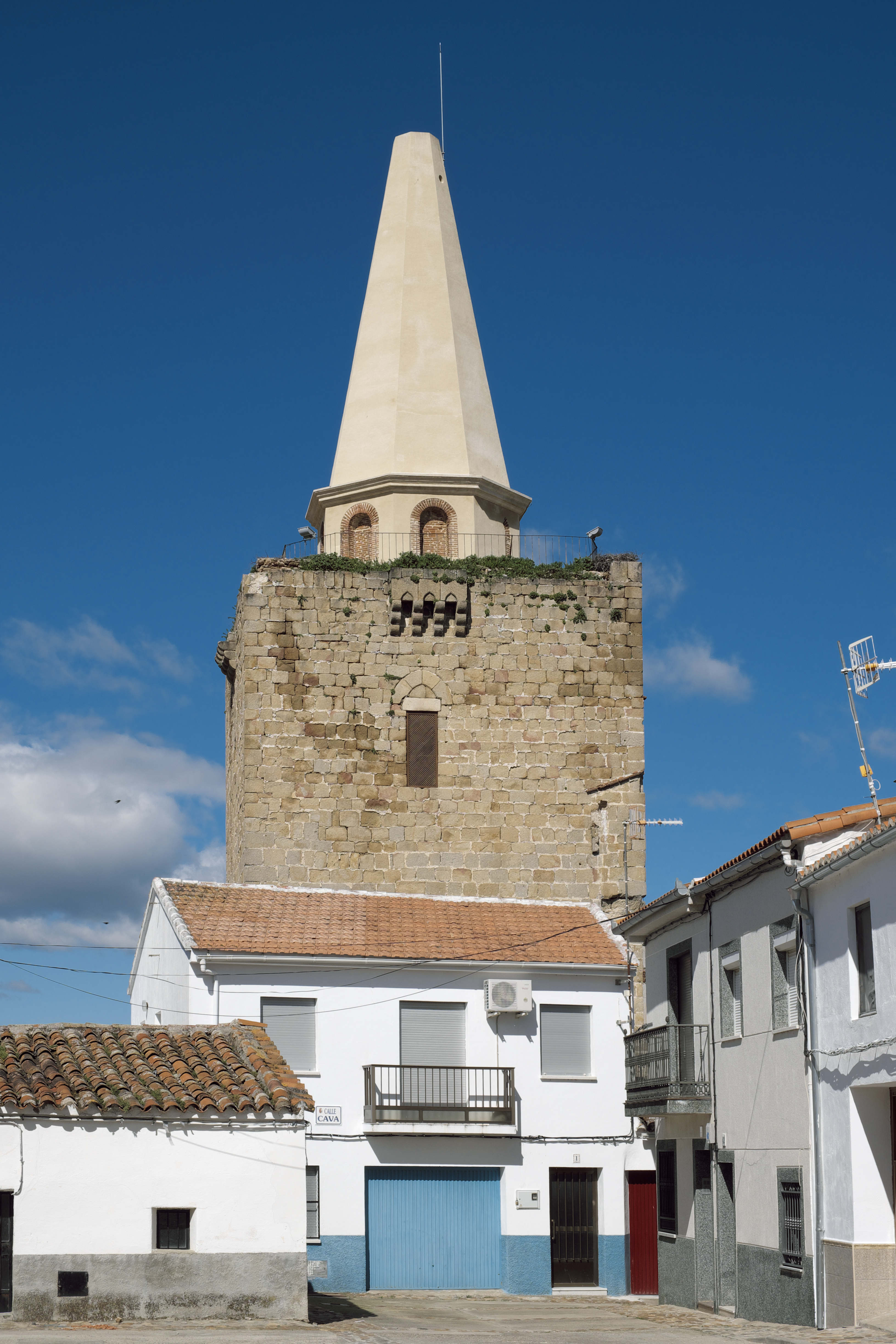 Wehrturm, La Picota, in Galisteo in der Provinz Cáceres (Extremadura/Spanien)